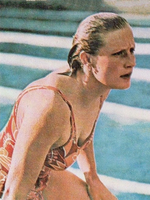 CAMPIONI dello SPORT 1973/74-Figurina n.242- STEPANOVA - NUOTO -Rec